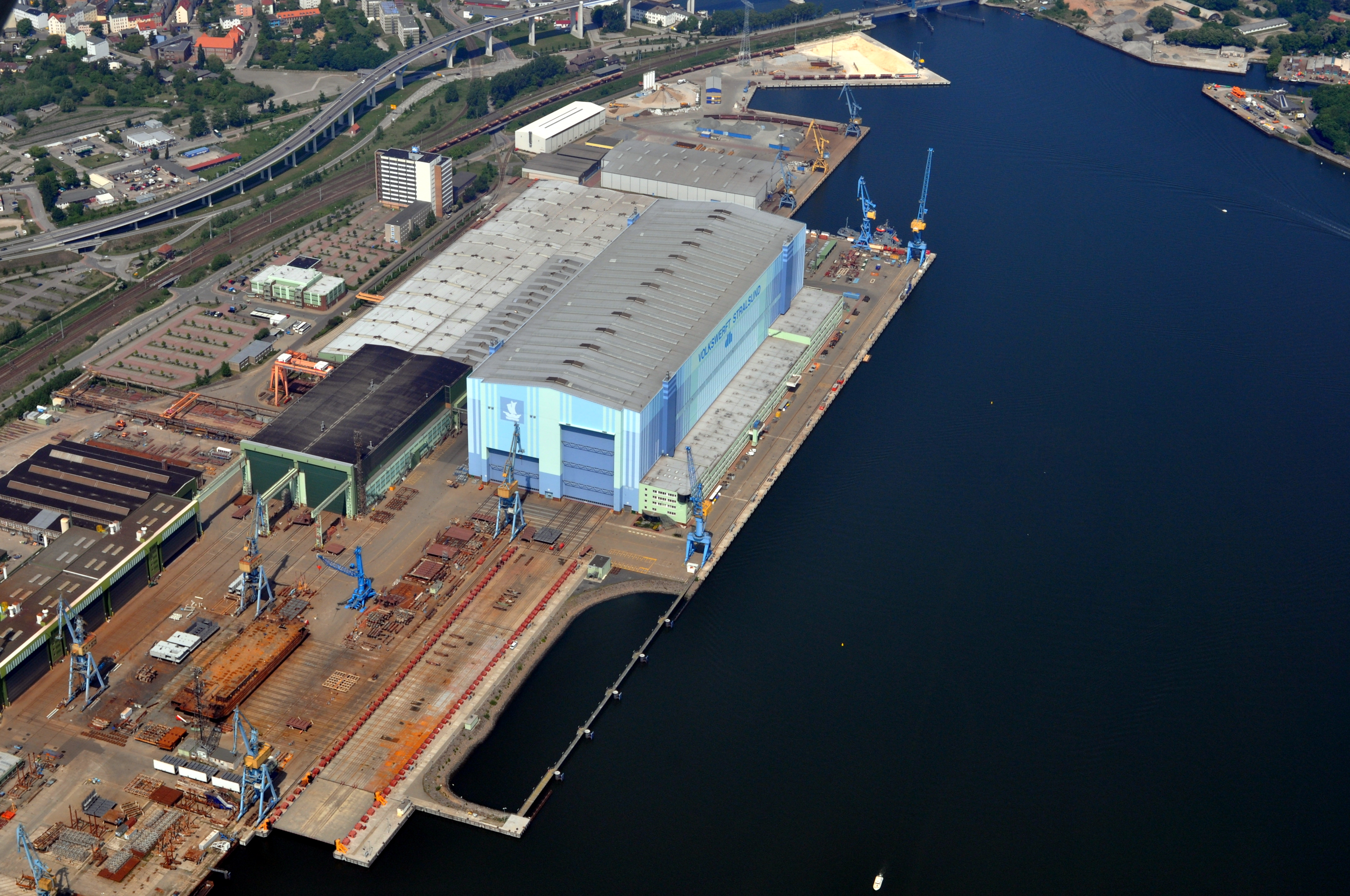 Die Bilder wurden von mir während eines einstündigen Rundflugs ab Flugplatz Güttin am 21. Mai 2011 aufgenommen. Die Bildbeschreibung steht im Dateinamen. Aufgenommen mit einer Nikon D5000 durch das Seitenfenster des Flugzeugs.